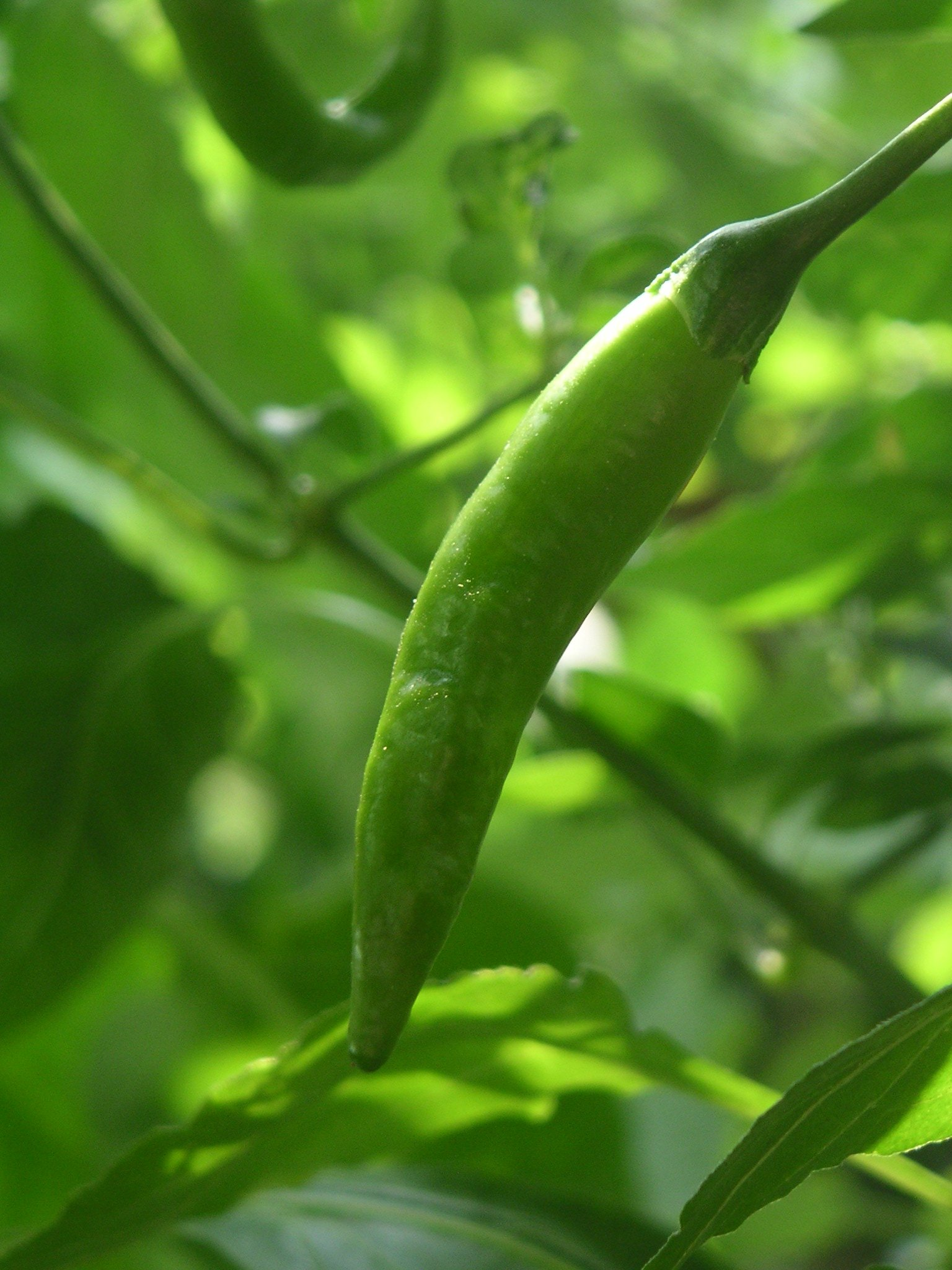 Unripe fruit of Capsicum baccatum cv. 'Criolla Sella'